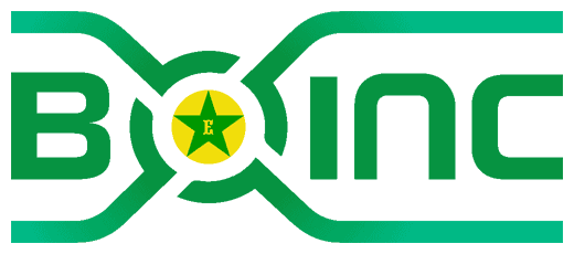 la signo de "Esperantujo", la teamo de volontula komputado